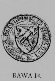 Rawicz Ig